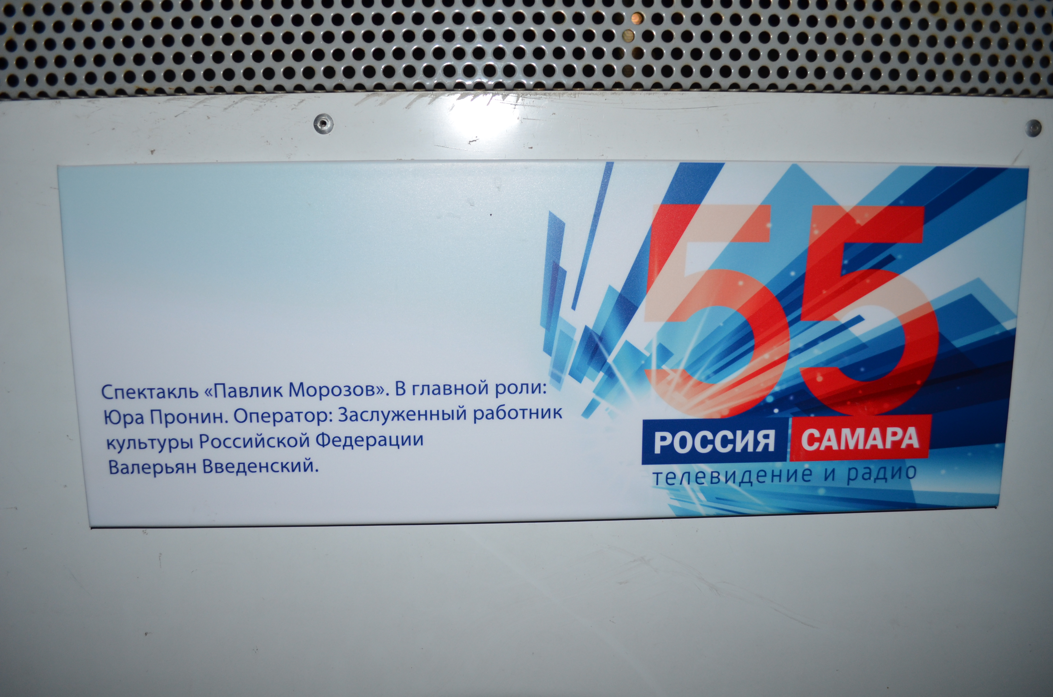 Подпись на стенде